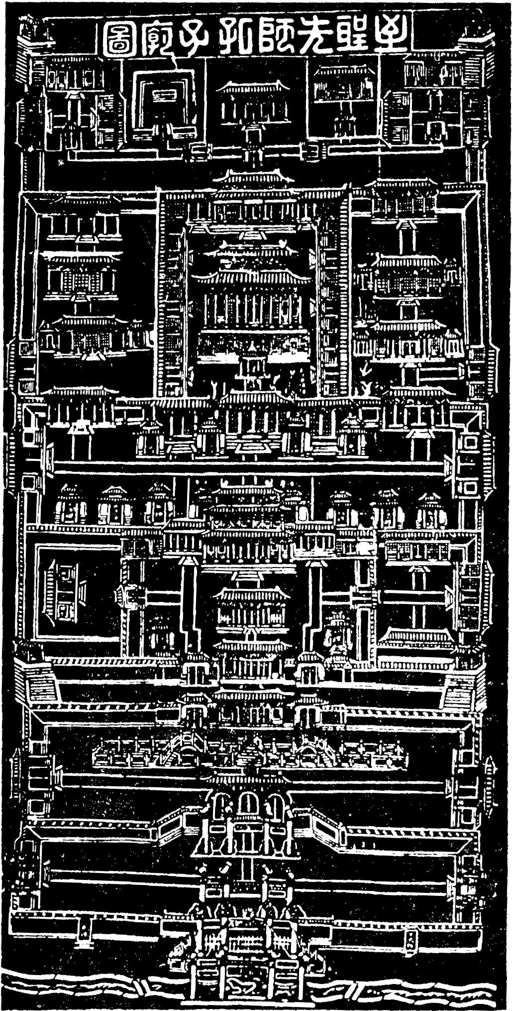 Plan świątyni Konfucjiusza w Qufu (chiń. 曲阜, pinyin: Qūfù), Szantung